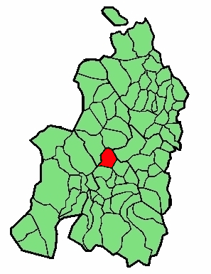 aipaturiko udalerriaren kokapena Nafarroa Beherean